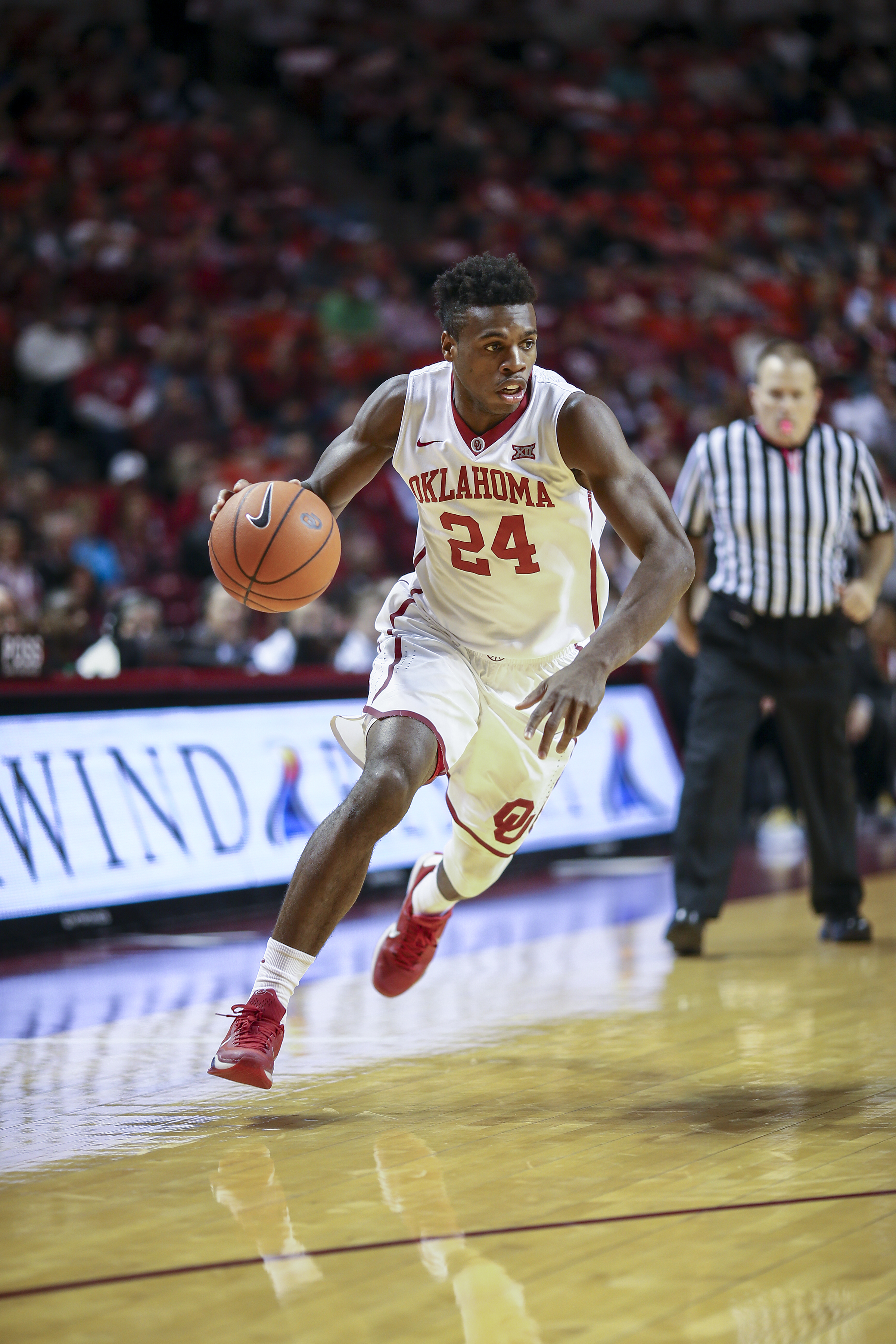 Buddy Hield